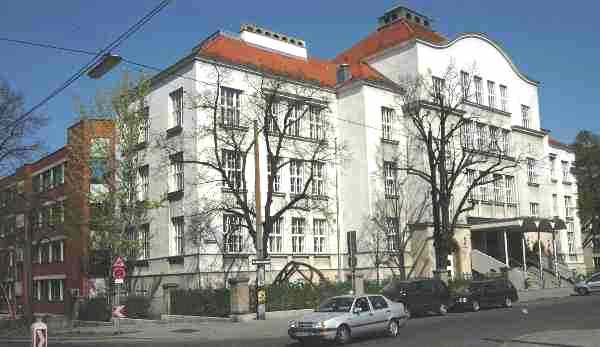 ehemalige Komenskyschule in Ottakring (Herbststraße 104)